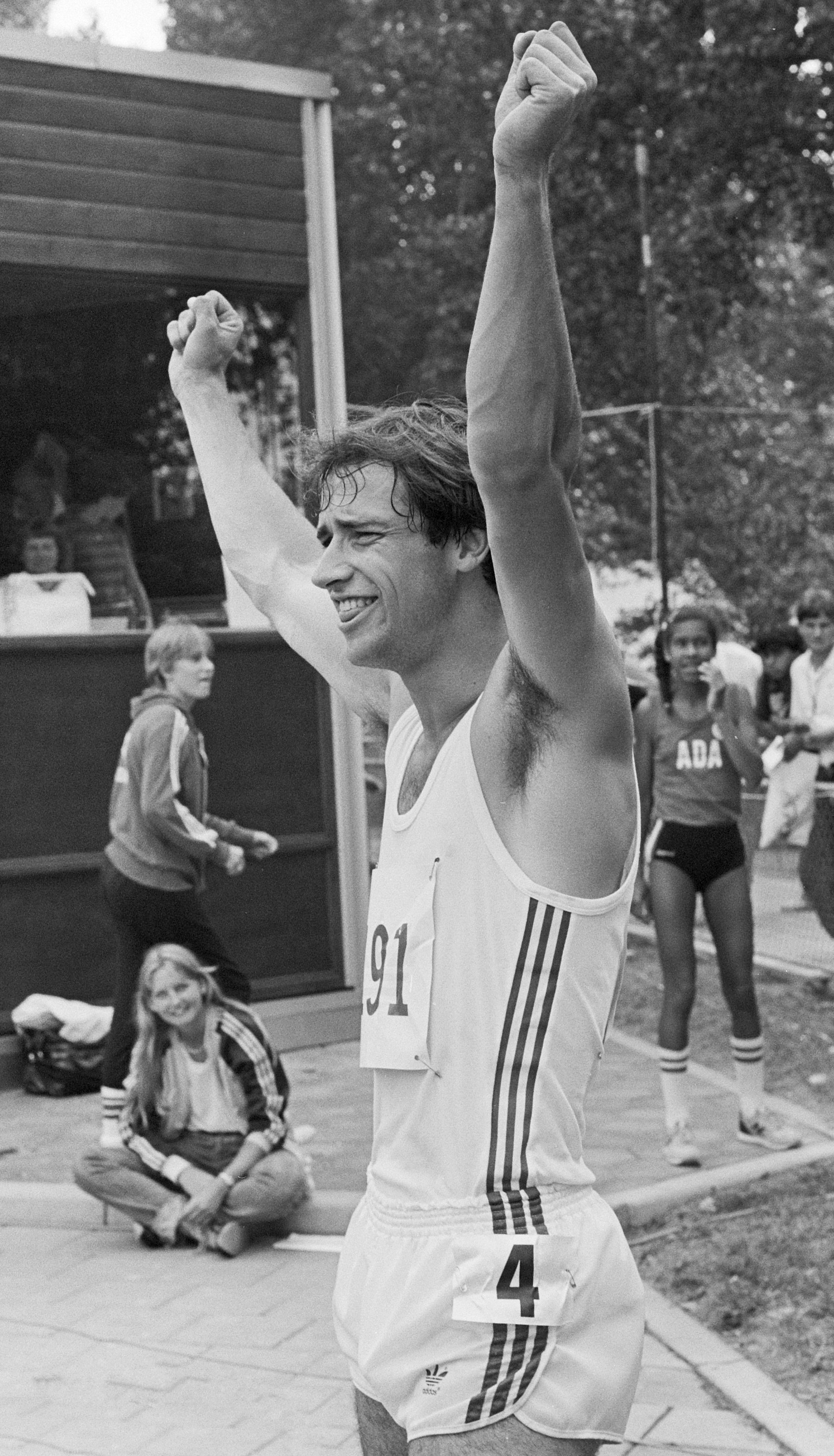 Nederlandse kampioenschappen atletiek in Amsterdam; juichende Mario Westbroek na winnen 200 meter